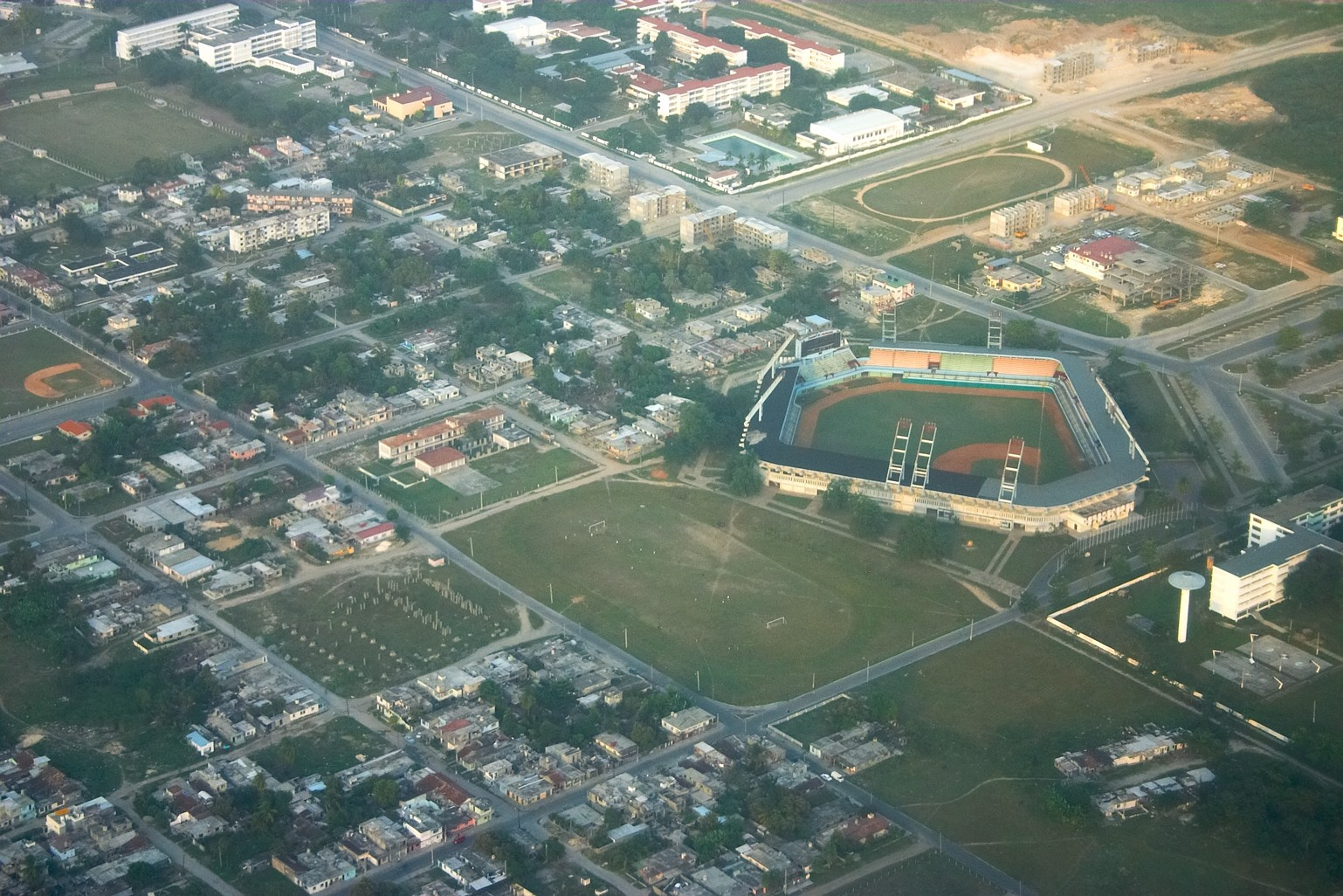 Cienfuegos, Cuba